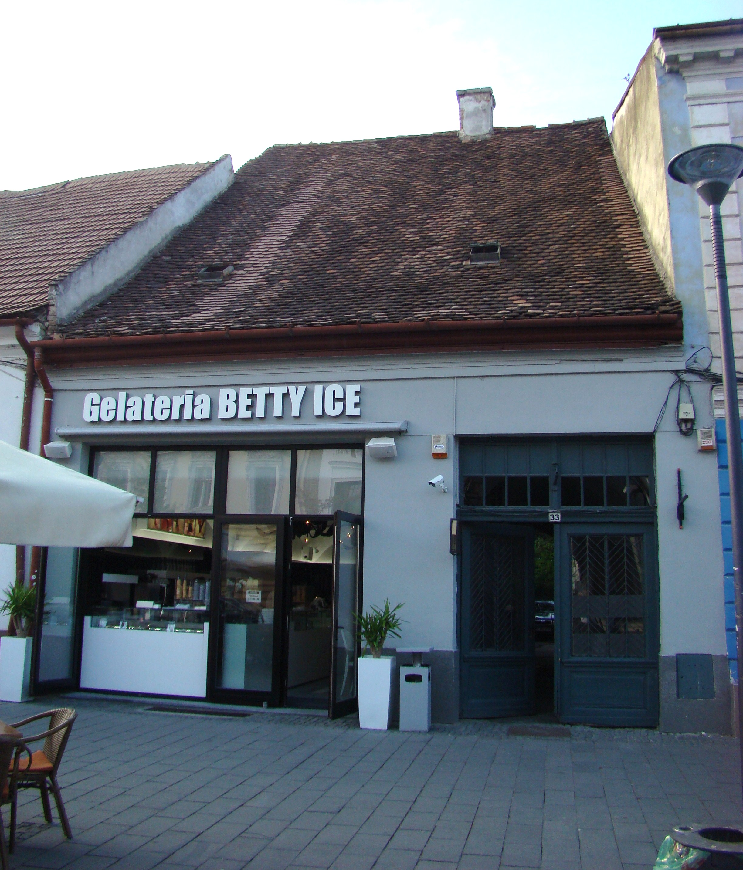 Clădire monument istoric, Bd.Eroilor, nr. 33